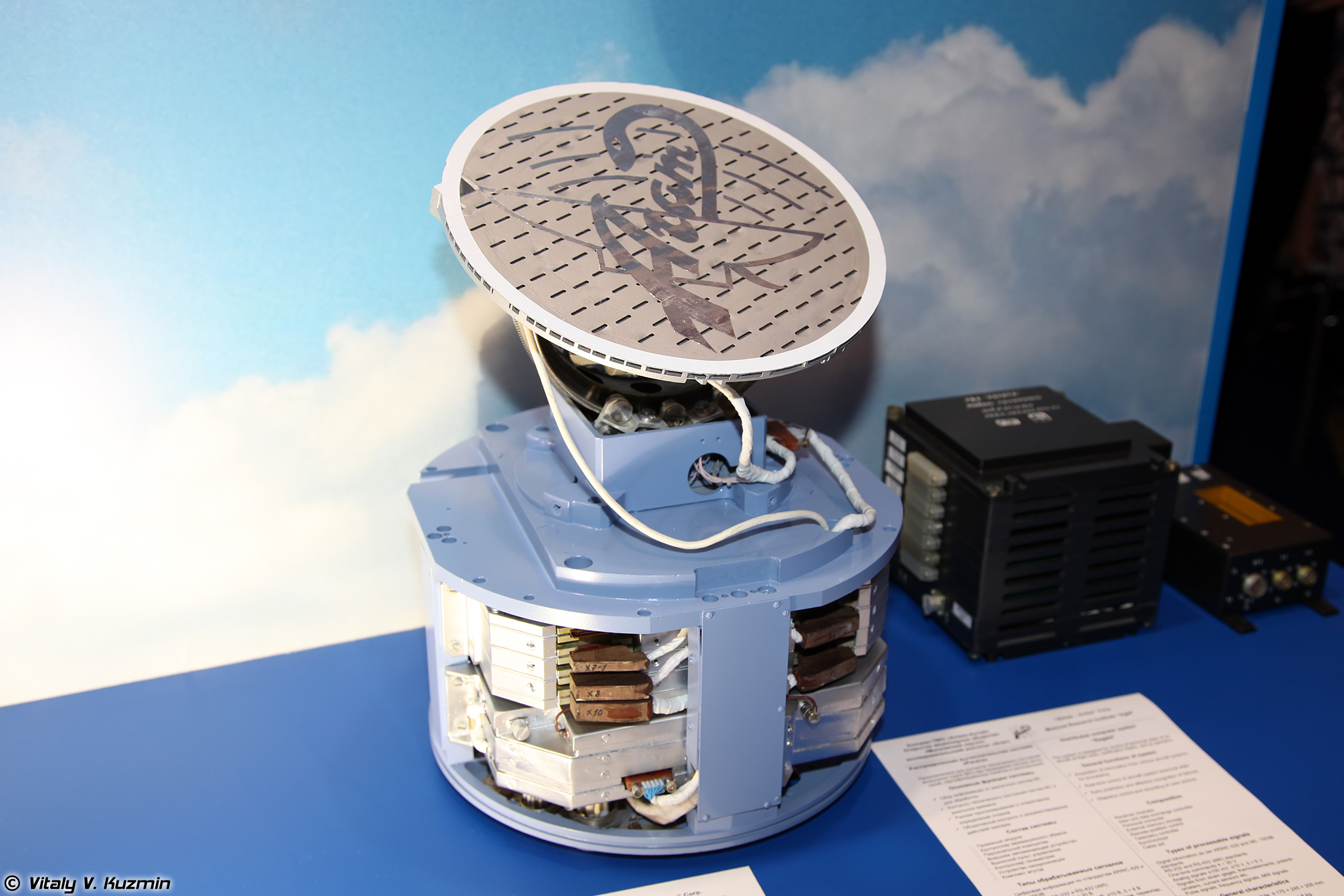 Активная радиолокационная головка самонаведения 9Б-1103М-350 (9B-1103M-350 active radar seeker head)